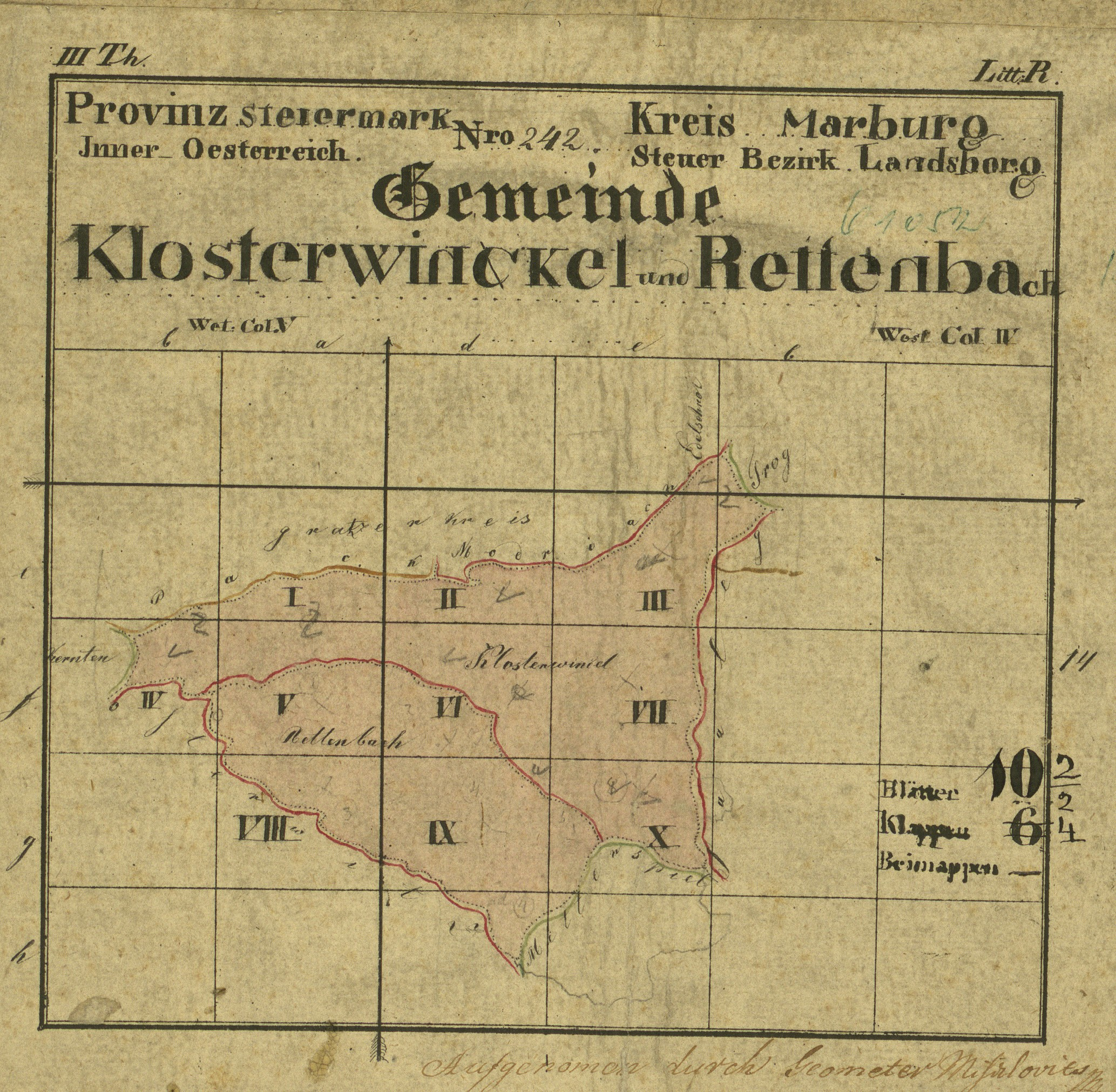 historische Vermessungskarte: österreichischer Kataster, Gemeinde Kloster. 1825. Skizze des Inhalts der Katastermappe (Kroki, Croquis).